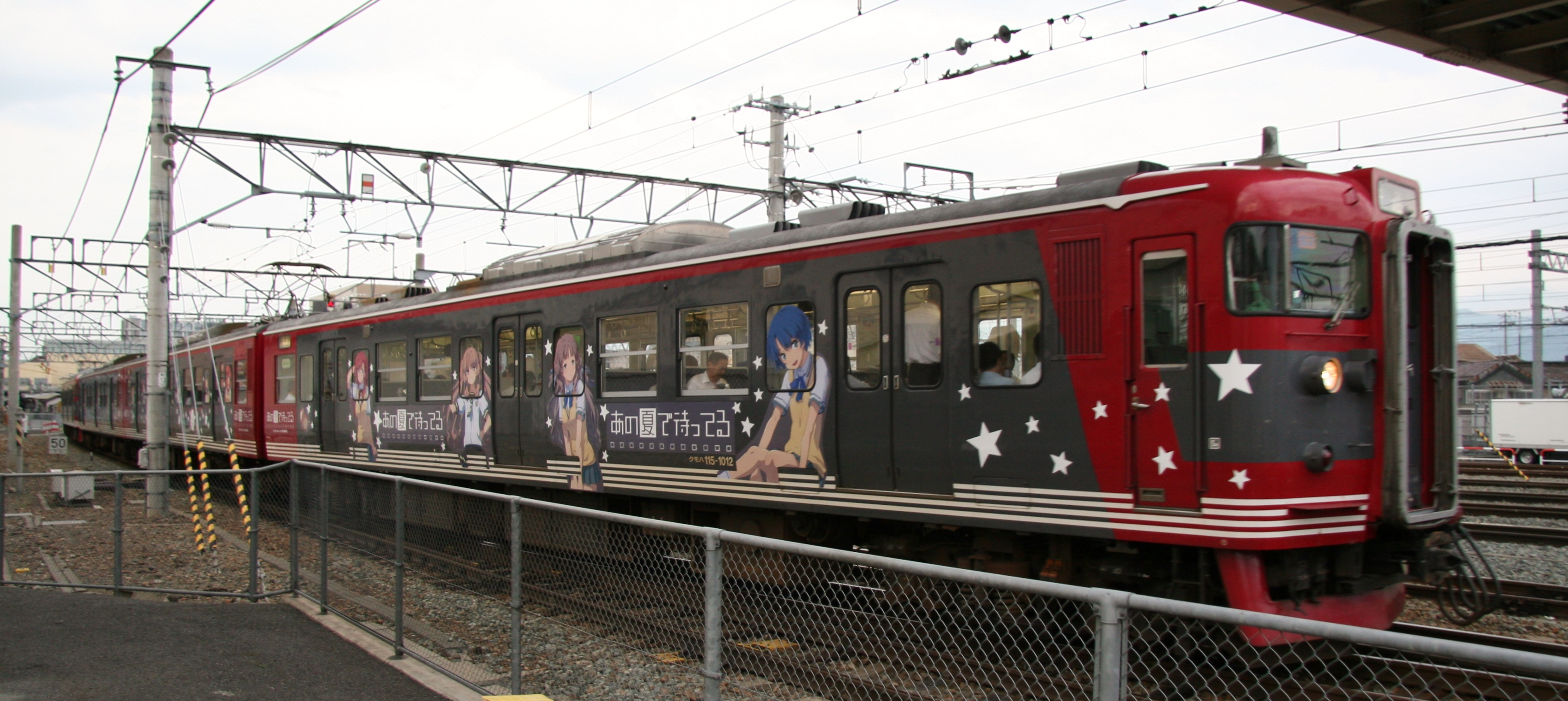 しなの鉄道115系 『あの夏で待ってる』ラッピング列車 1両目（4両目以降ラッピングはされていない）